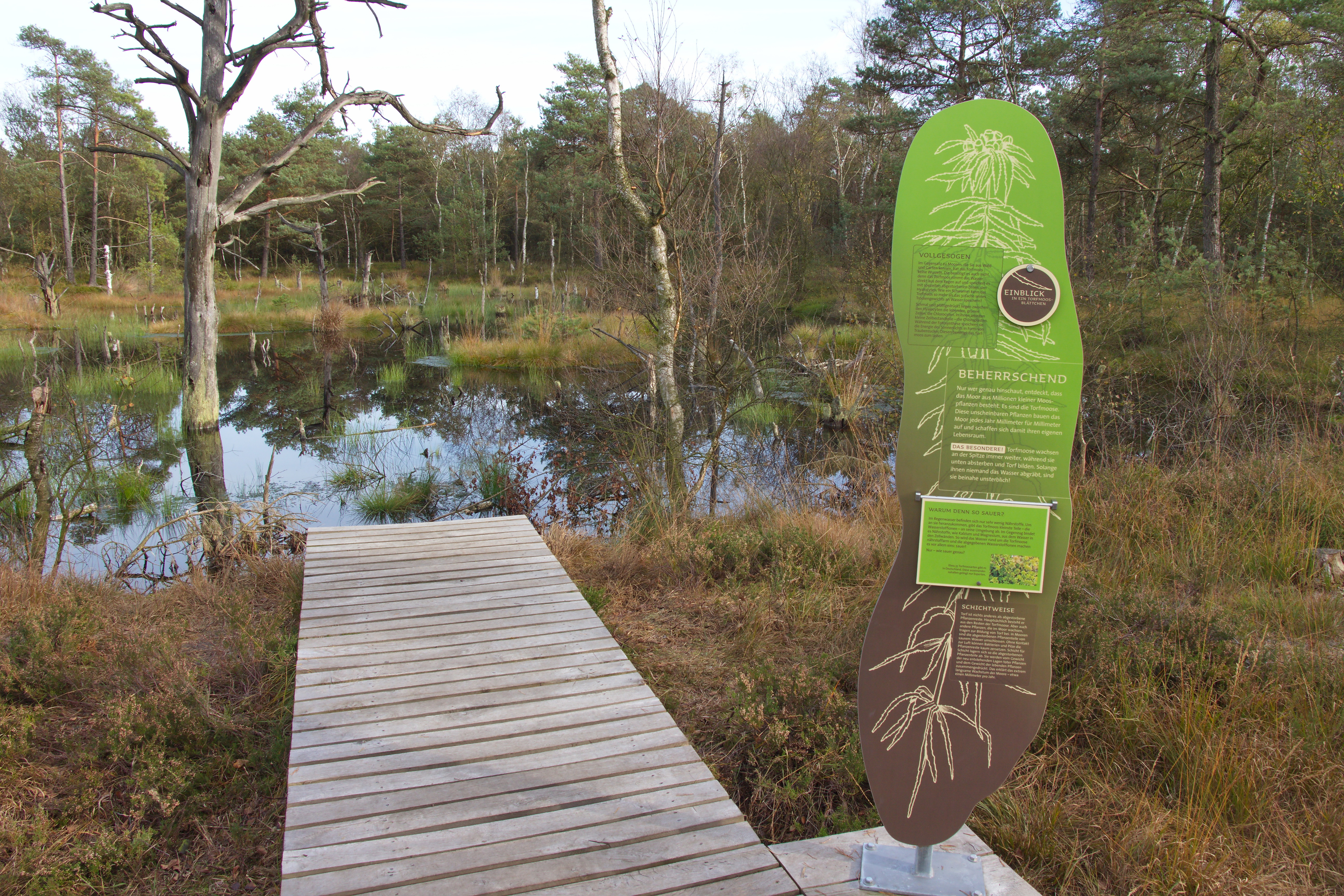 Infostation im Pietzmoor in der Lüneburger Heide bei Schneverdingen, Niedersachsen, Deutschland